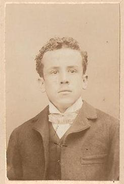 Gral. Manuel C. Michel de joven